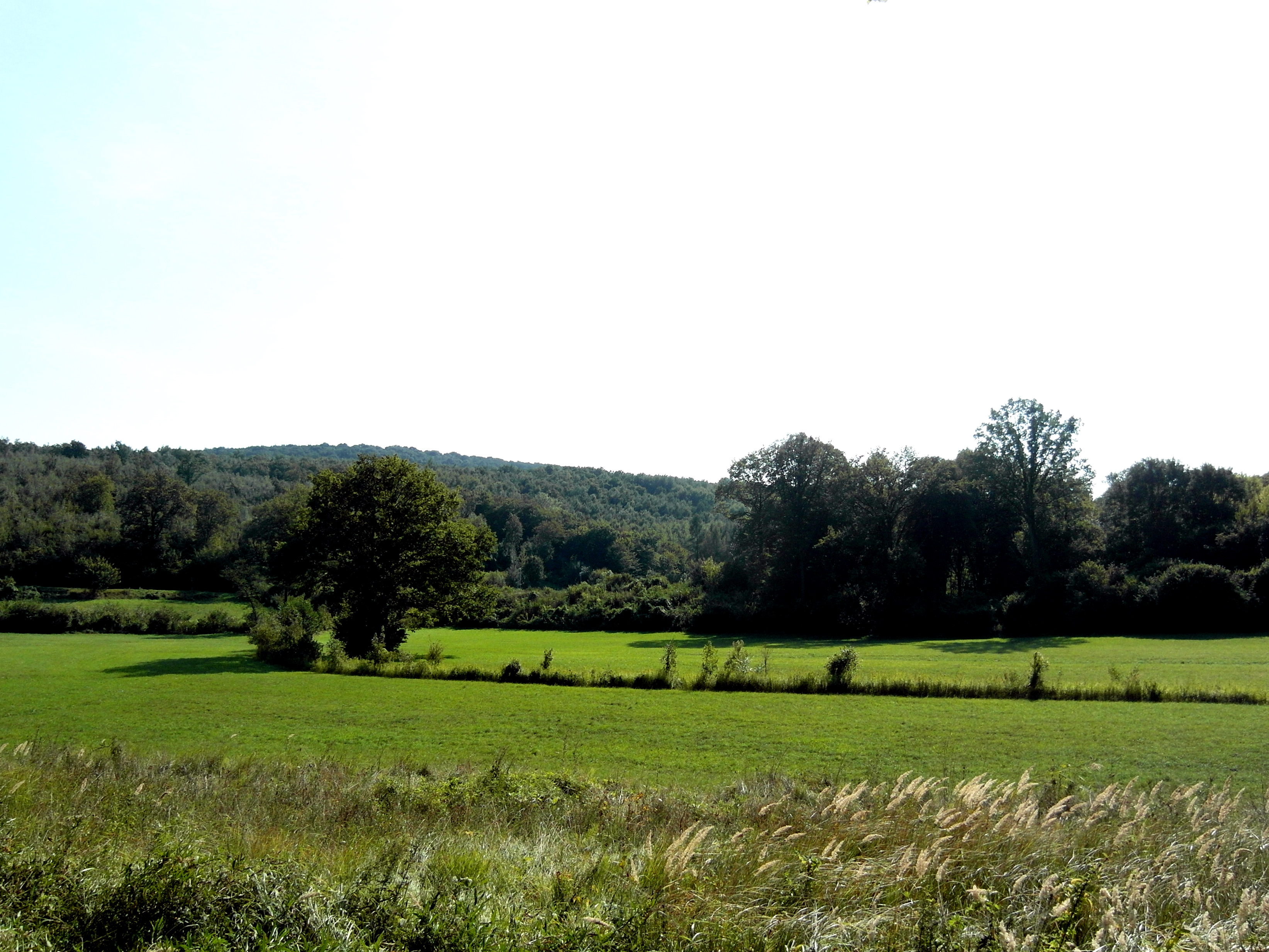 Wiesenbach Wiese im Rohrwald